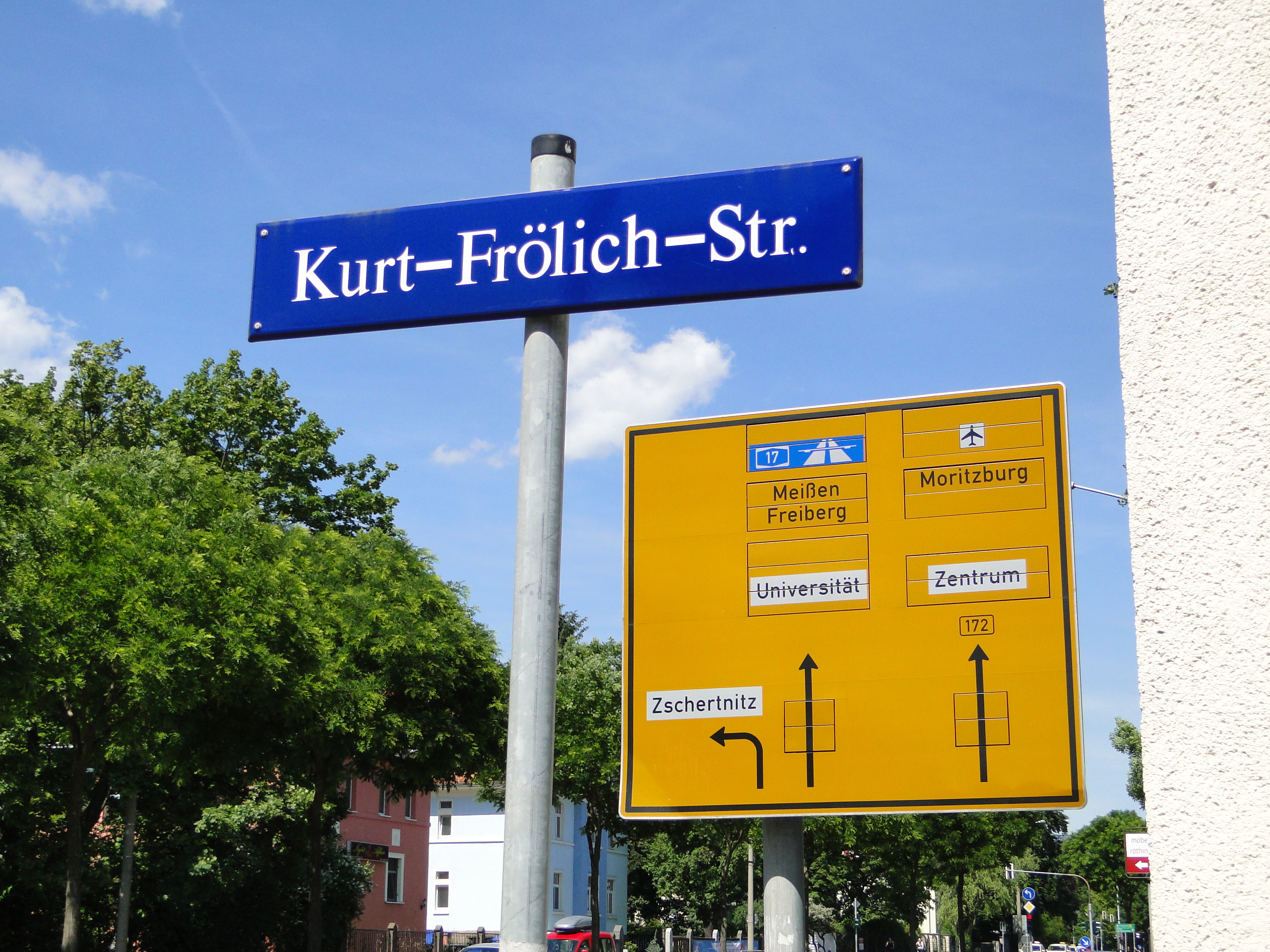 Teplitzer Straße, Kurt-Frölich-Straße in Strehlen, Straßenschild